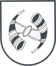 Herb miasta Ołyka